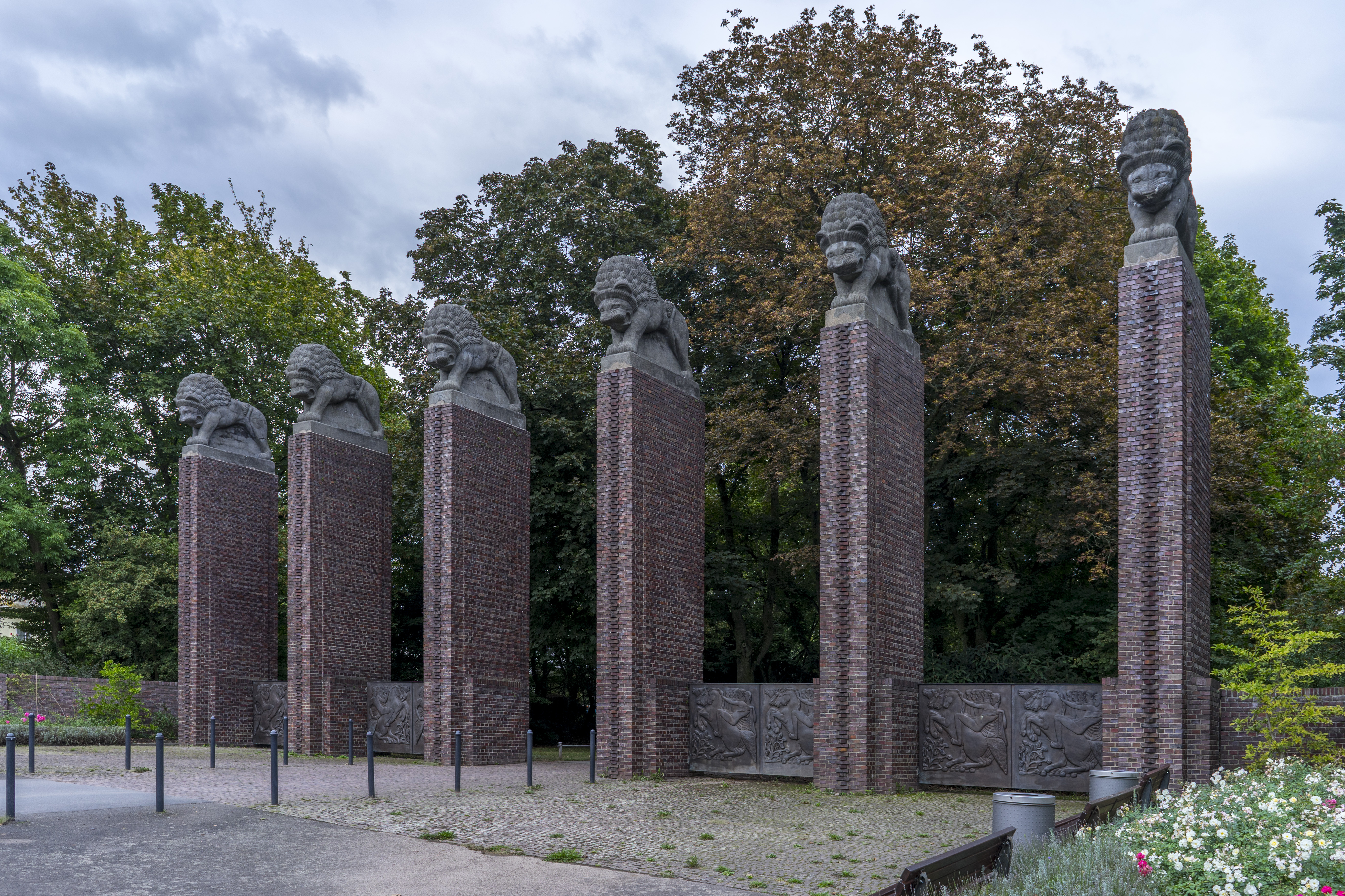 Löwentor, Rosenhöhe Darmstadt